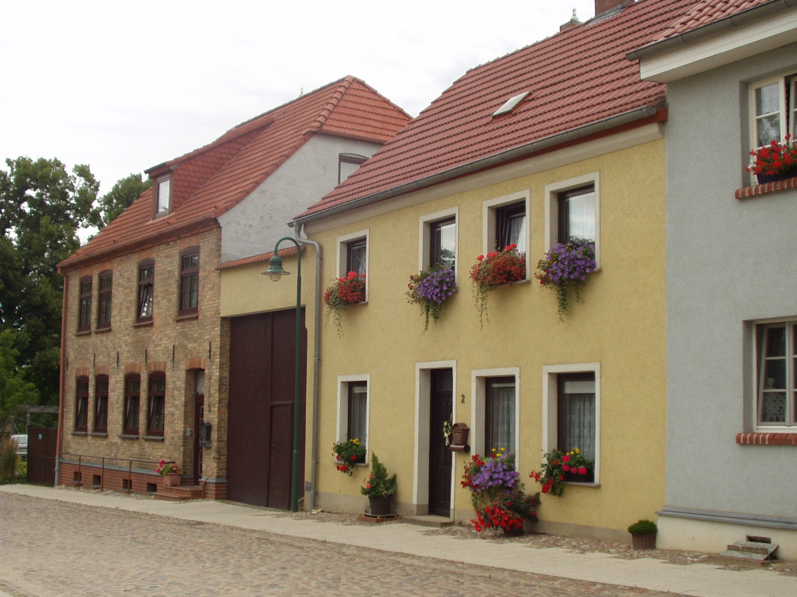 Houses in Wesenberg, Germany